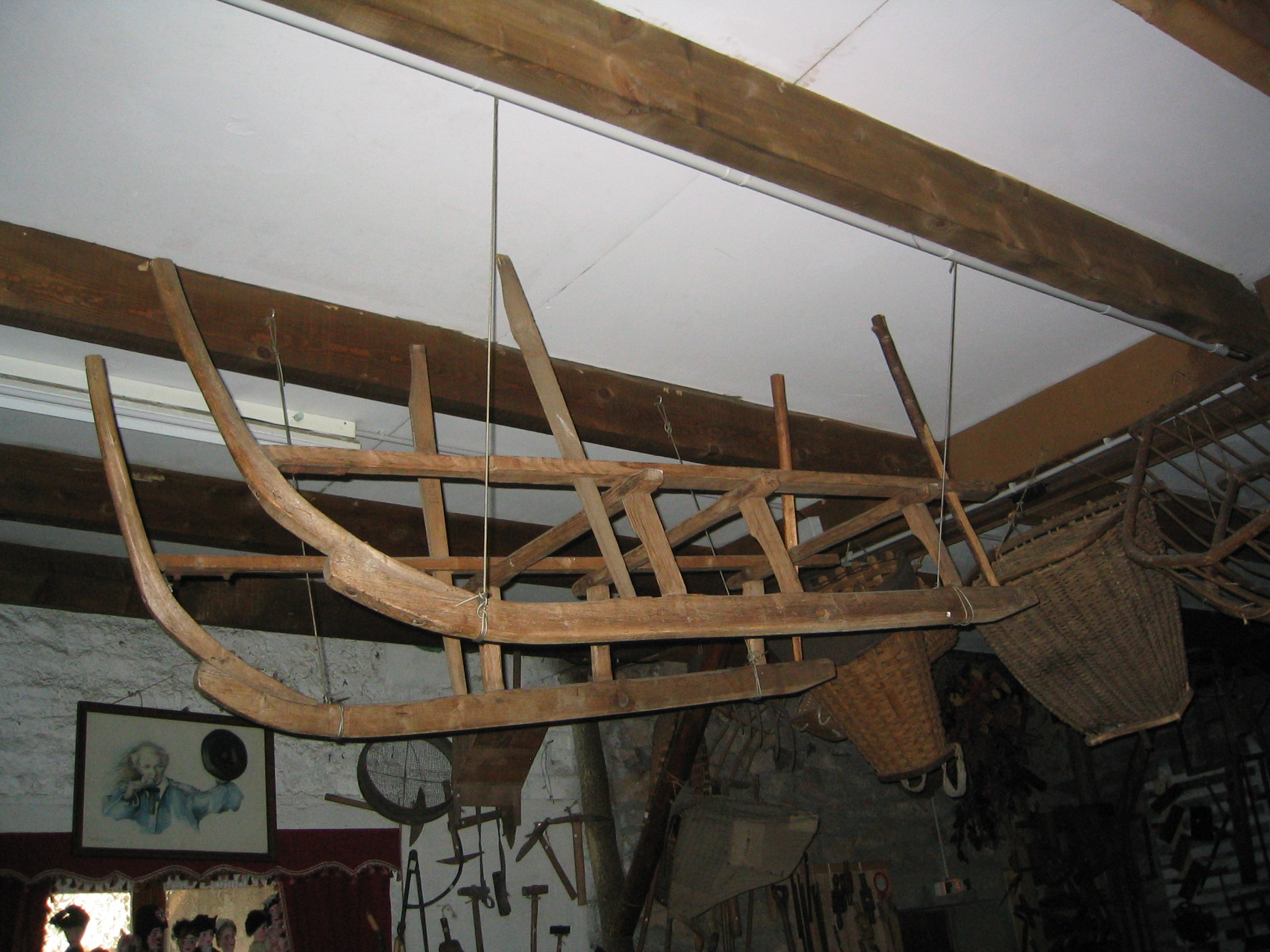 Schlitte vosgienne (sorte de traîneau servant à transporter le bois en montagne) à la ferme-musée de la Soyotte, Saint-Dié-des-Vosges, France